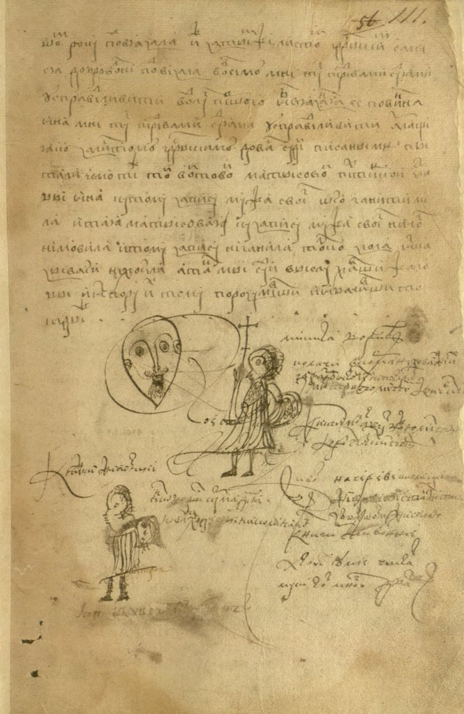 Запись в ранней актовой книге №1 Гродненского земского суда за 1556 г. на с. 111